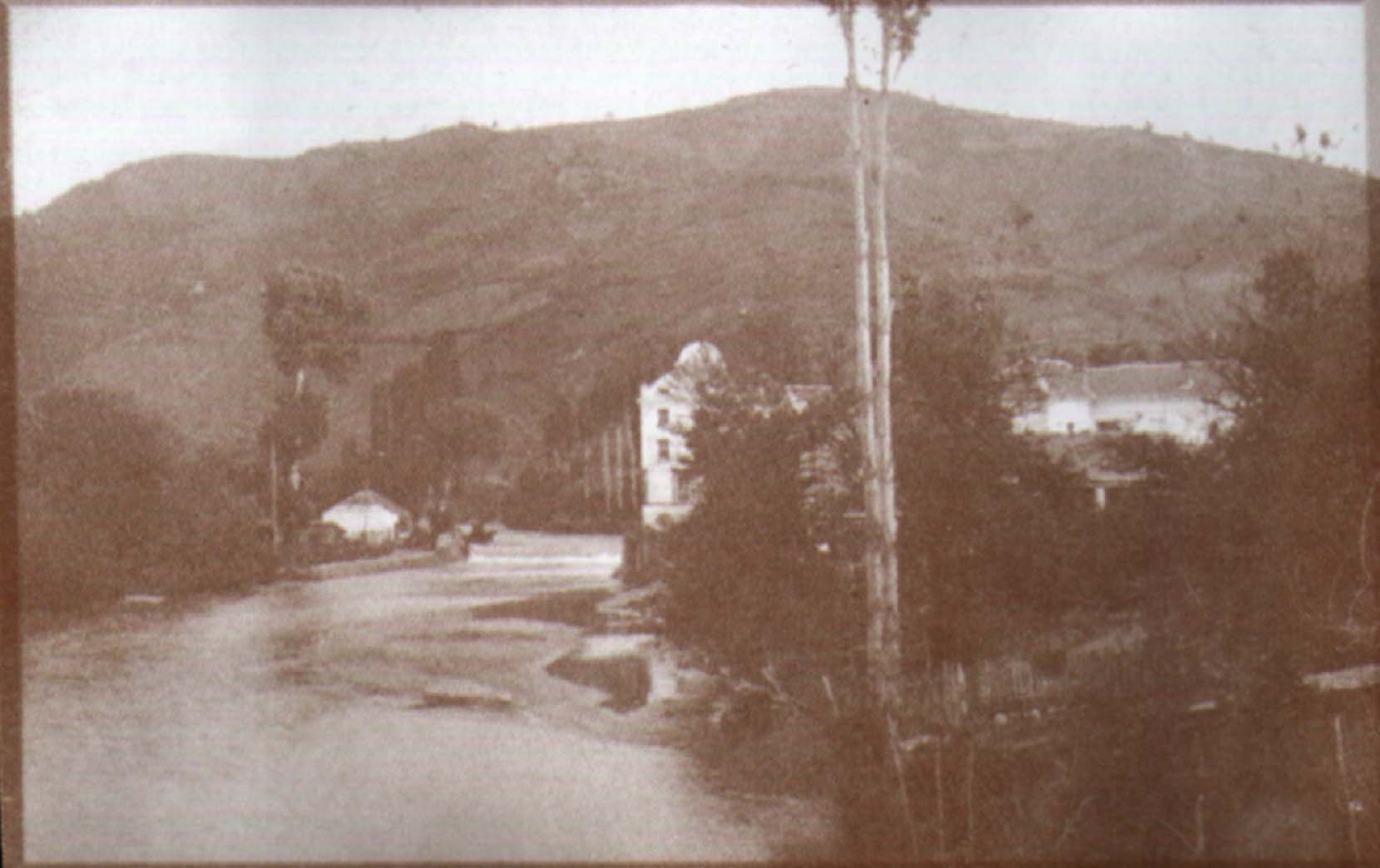 Власотинце, млин и јаз на Власини